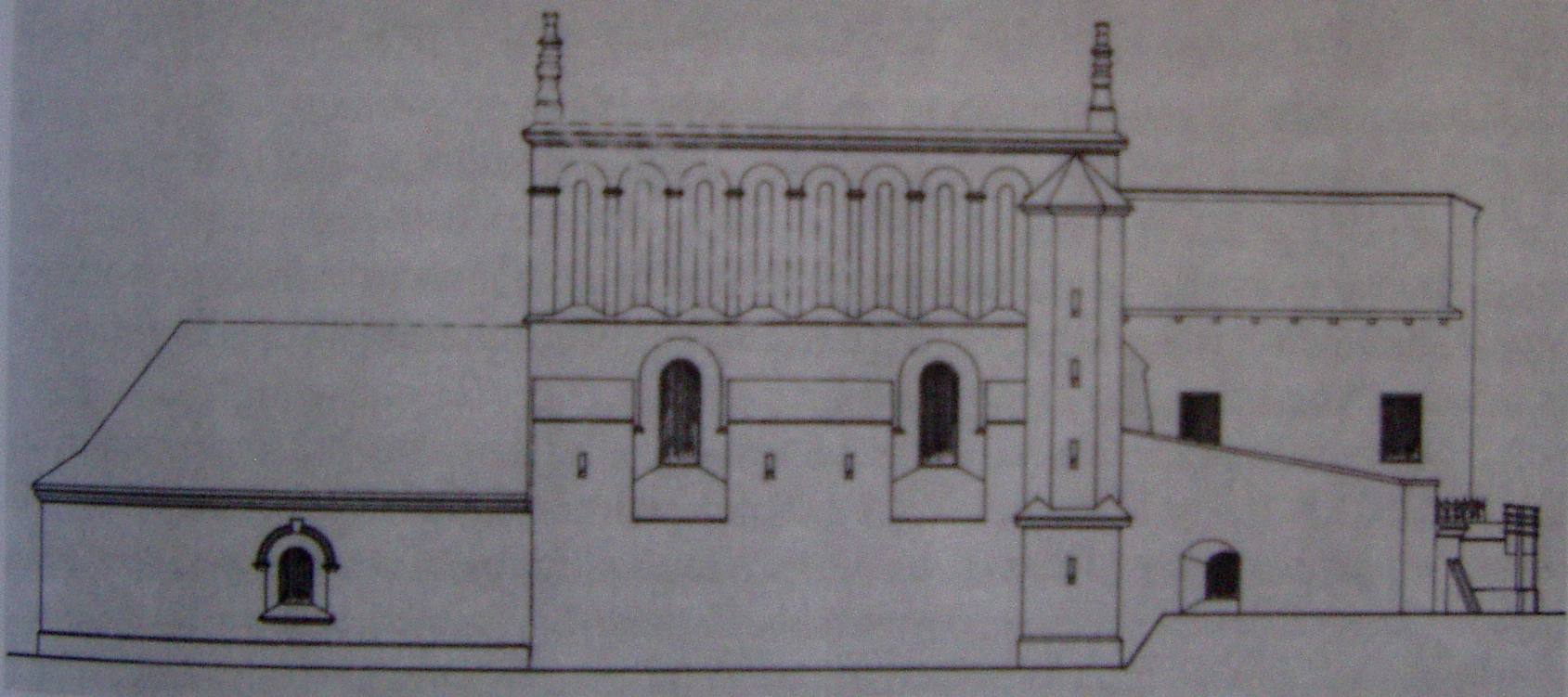 Projekt przebudowy więźby dachowej oraz restauracji attyki Starej Synagogi w Krakowie (1913)